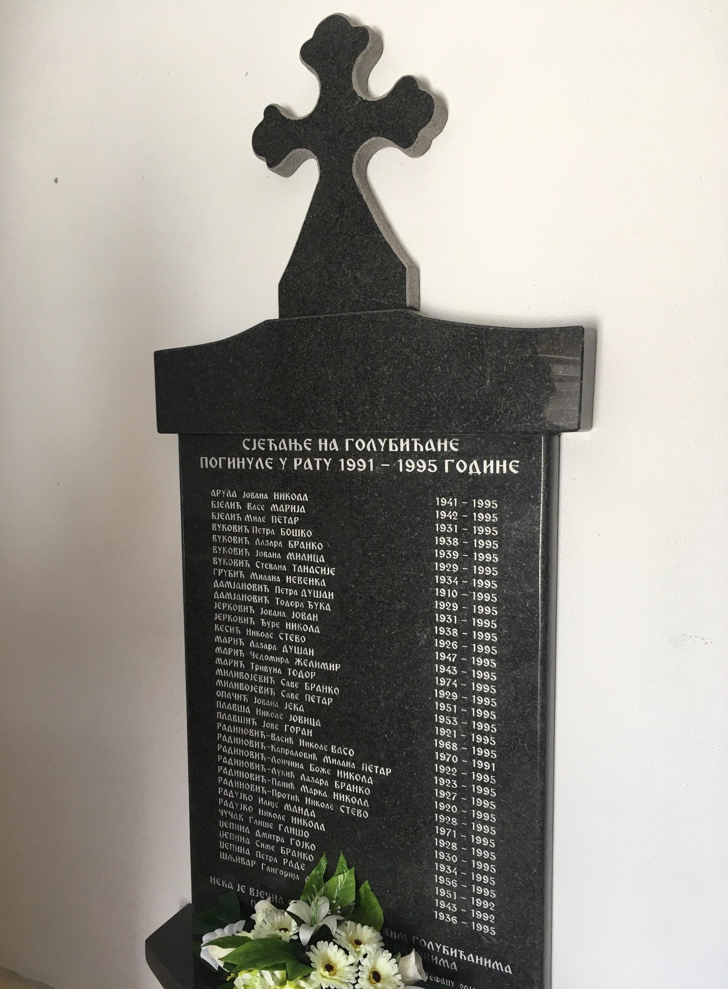 Srpski (latinica): Spomen-sjećanje na Golubićane poginule u ratu devedesetih